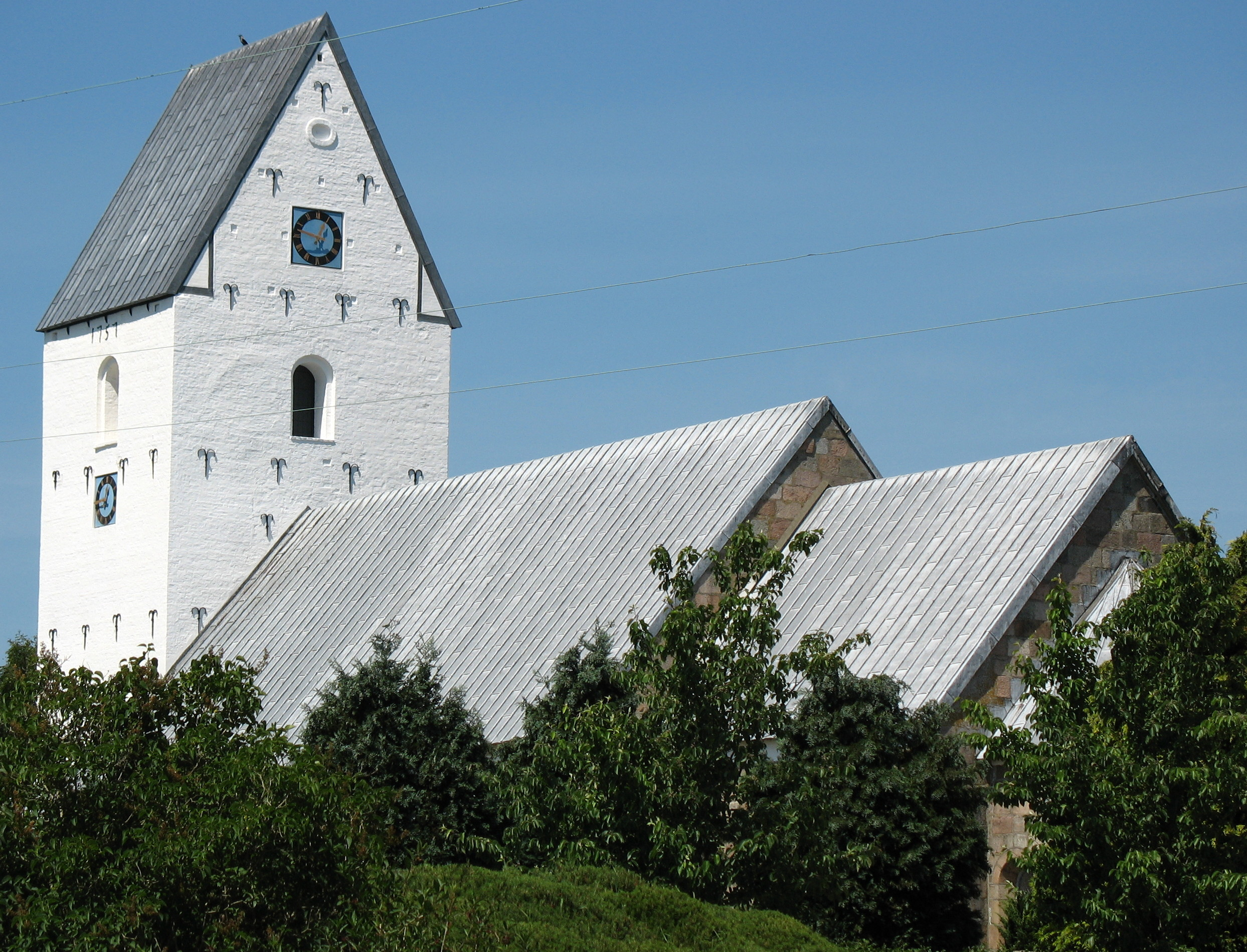 Ølgod Kirke